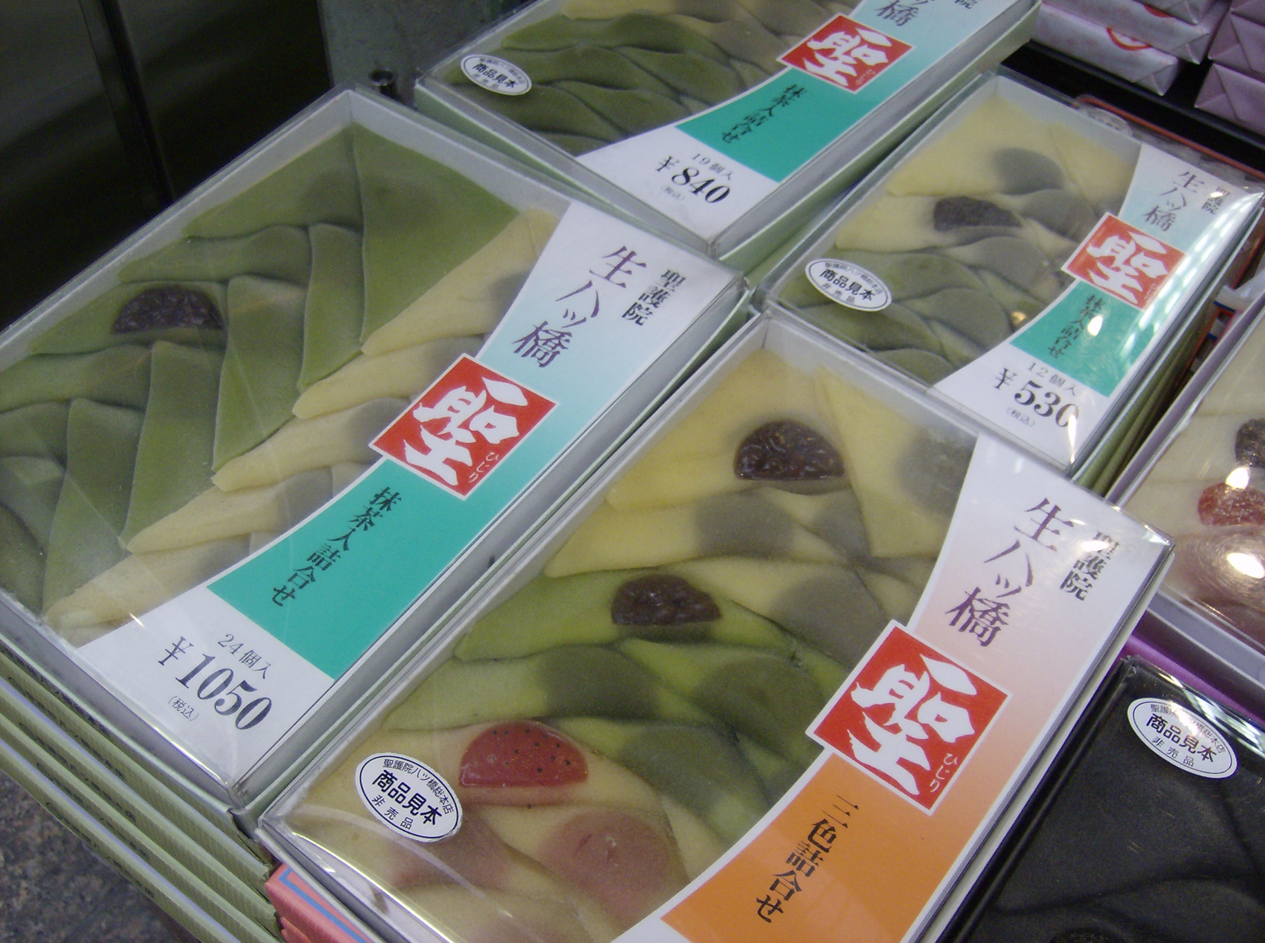 BEAN TURD